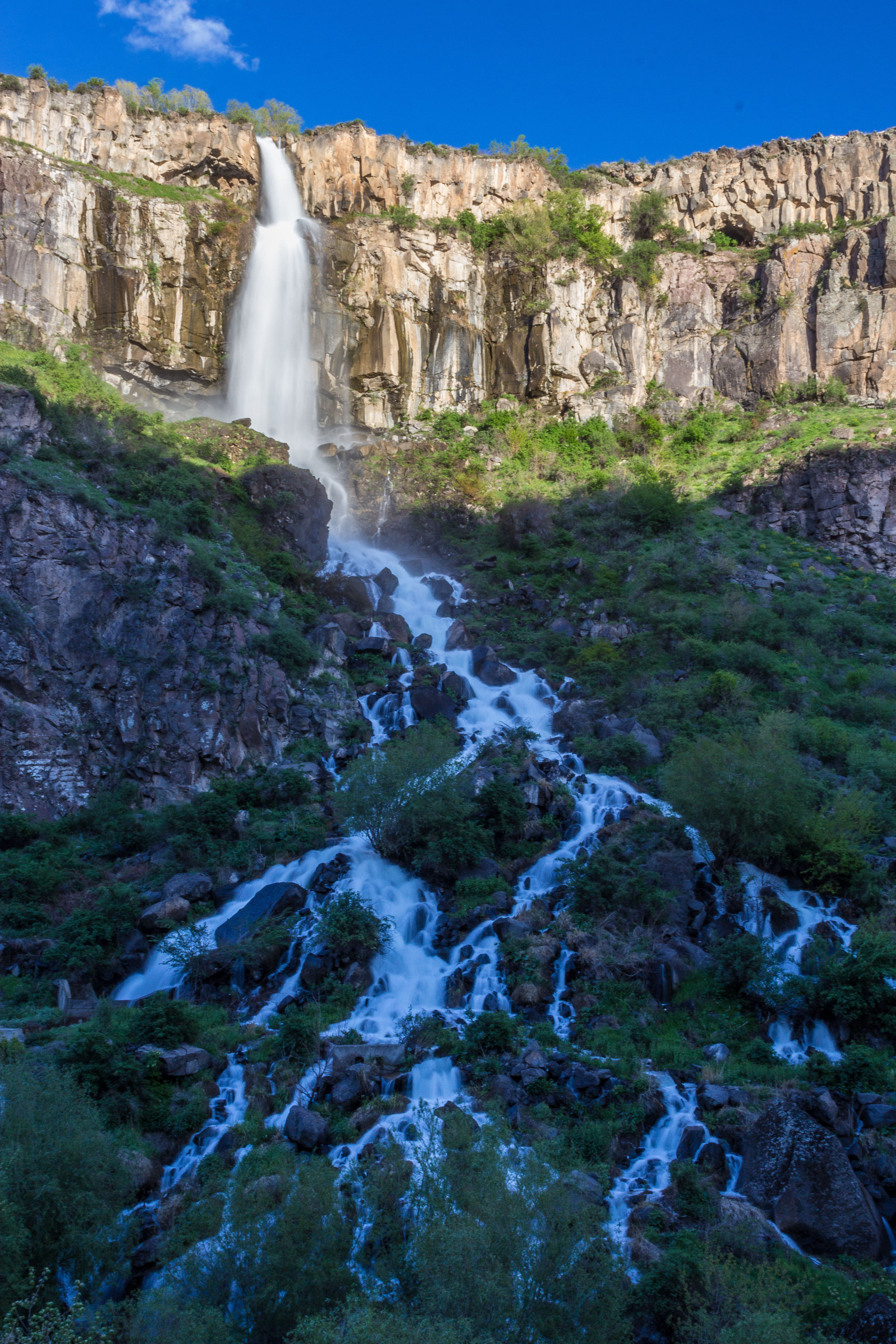 2014-05-04_18-51-34_IMG_6588-2